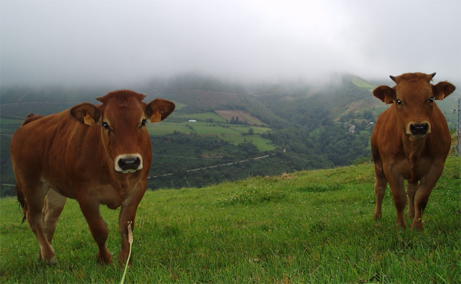 Ganado en El Bierzo (provincia de León, España) junto al Camino de Santiago.